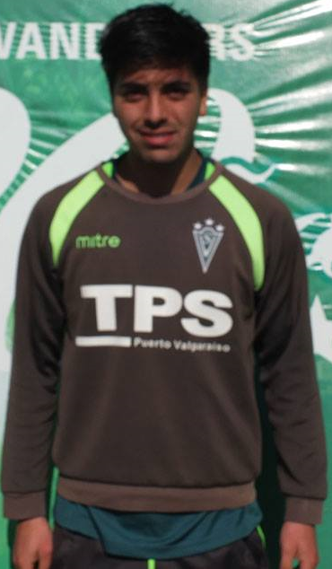 Edición de la fotografía "SebastianReyes.jpg", que muestra al jugador de fútbol Sebastián Reyes.